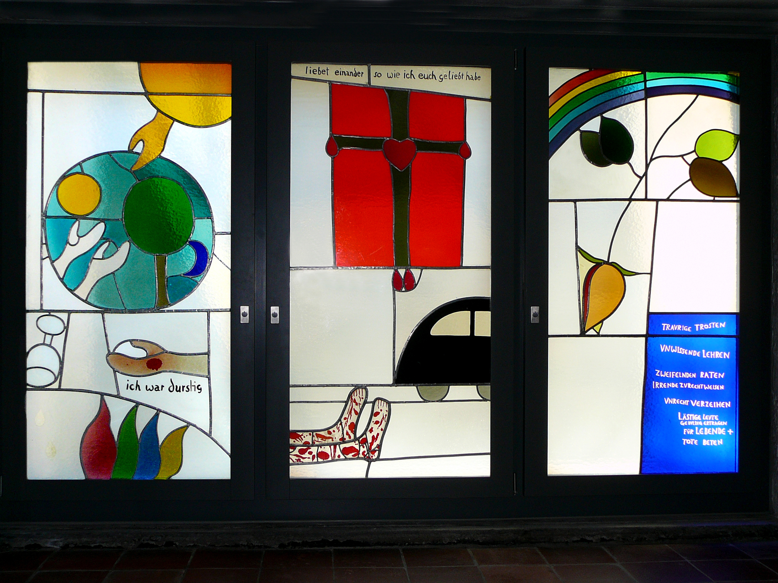 Glasfenster von Max Rüedi in der Krypta der Römisch-katholischen Kirche Bruder Klaus Zürich